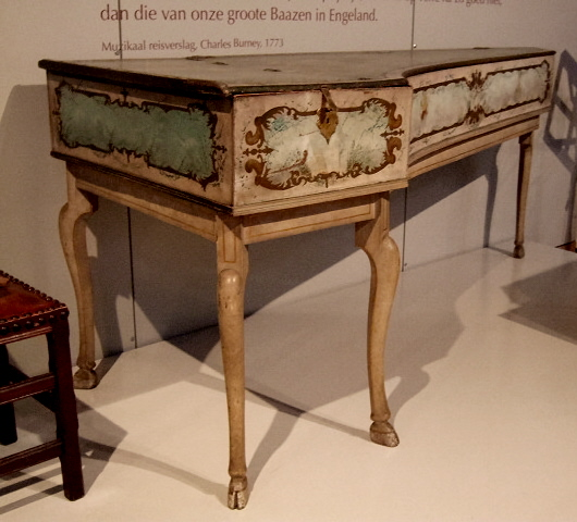 Clavecin de Johann Daniel Dulcken (Anvers, 1747) - Anvers, Vleeshuis Museum